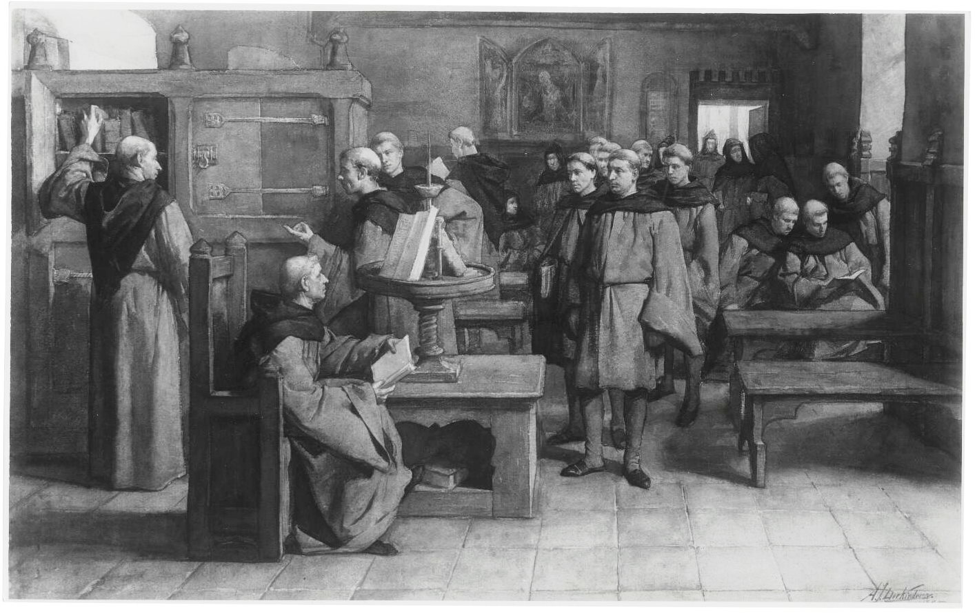 Geromantiseerde weergave van Geert Grote met zijn volgelingen (Moderne Devotie), later Broederschap des Gemenen Levens. Aquarel van Antoon Derkinderen, 1885.